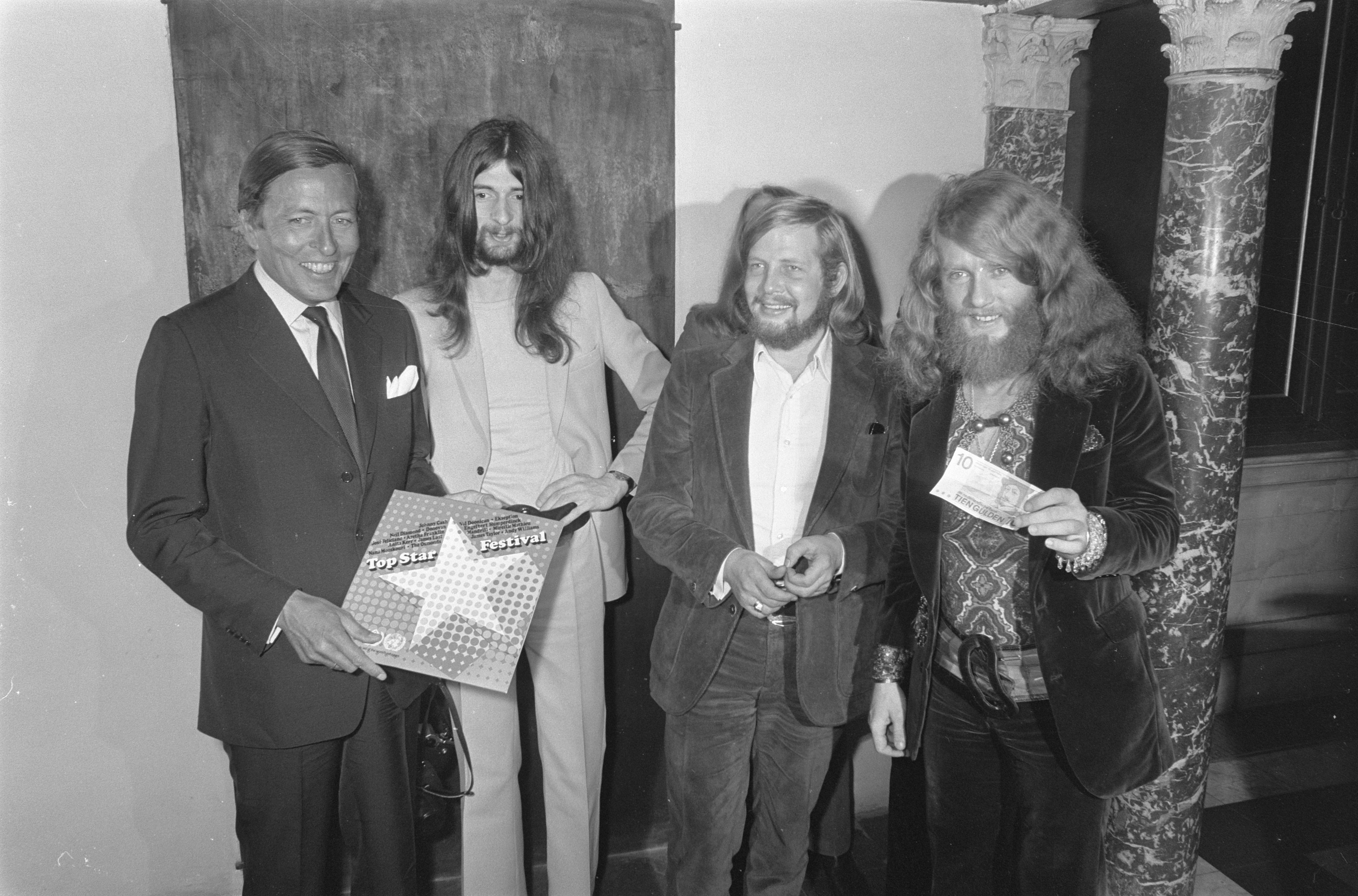 Prins Claus koopt in Paleis op de Dam eerste exemplaar van LP "Top Star Festival" van Ekseption en andere artiesten, rechts Rick van der Linden. De opbrengst van de elpee gaat naar het vluchtelingenwerk van de VN. Amsterdam, 30 maart 1972